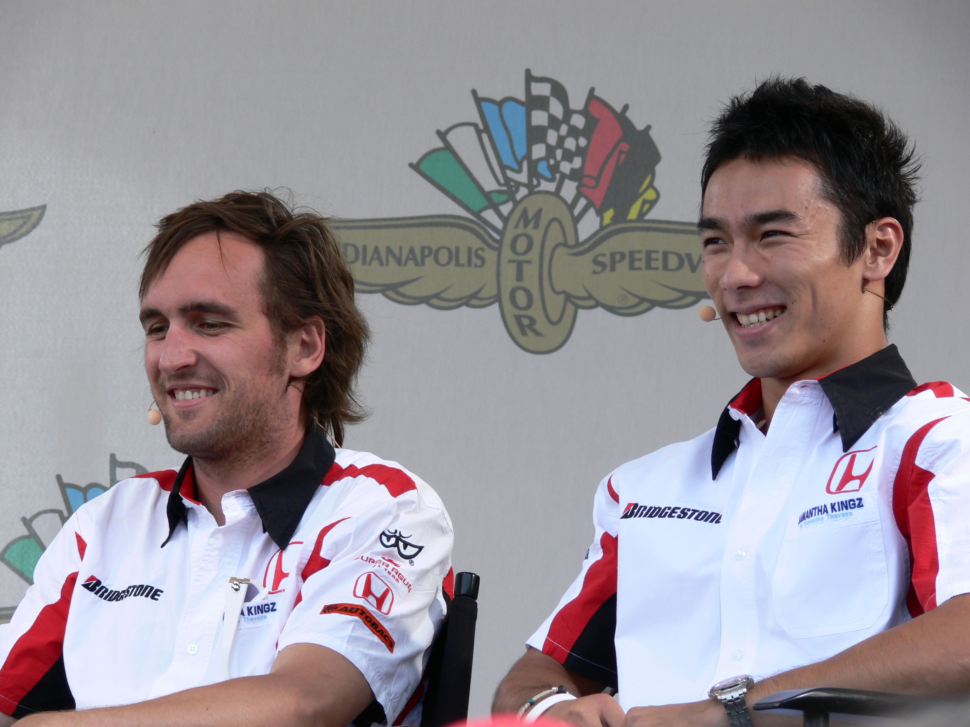 ニコニコ